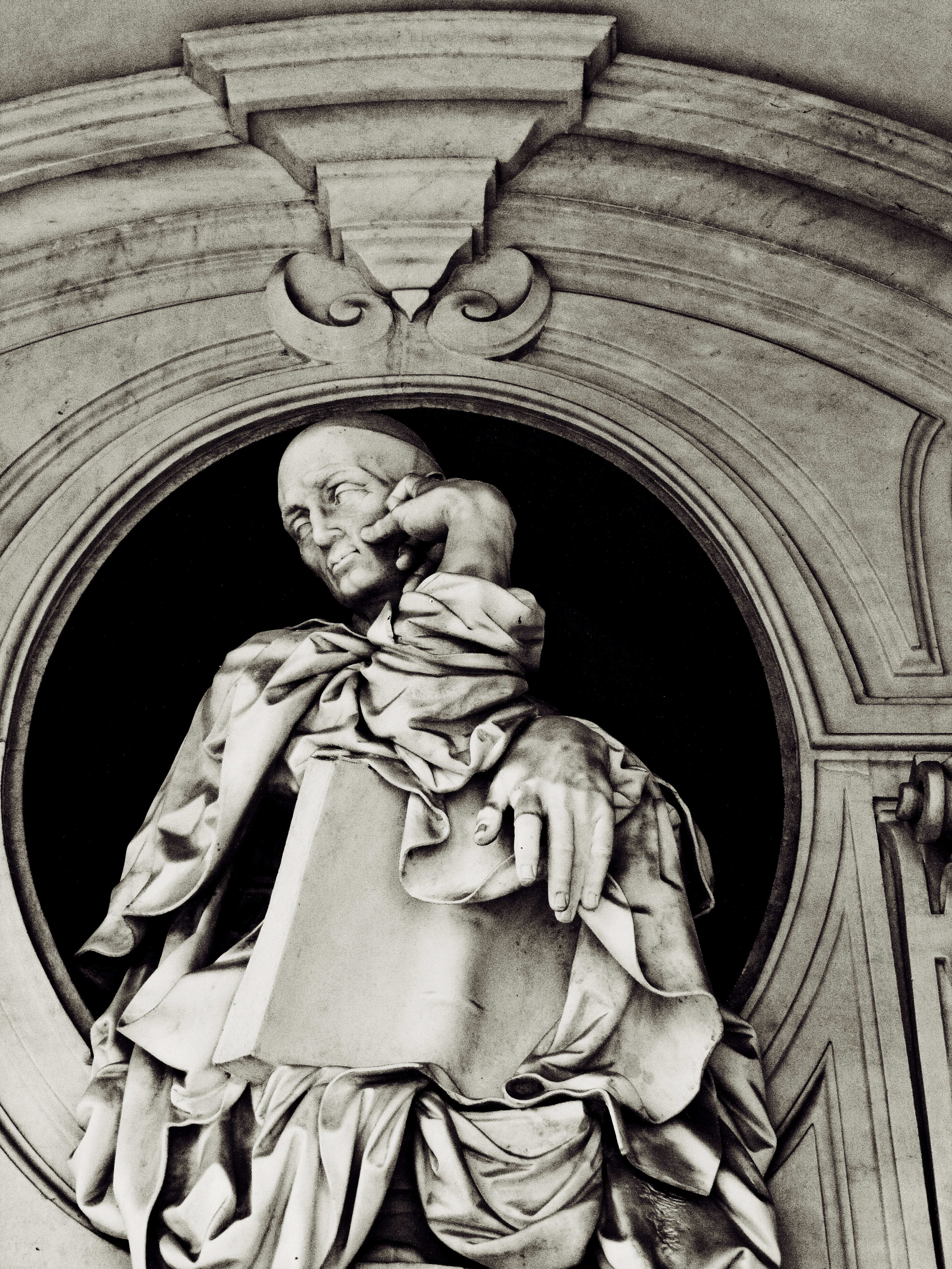 Chiostro Grande, Certosa di San Martino (Napoli)